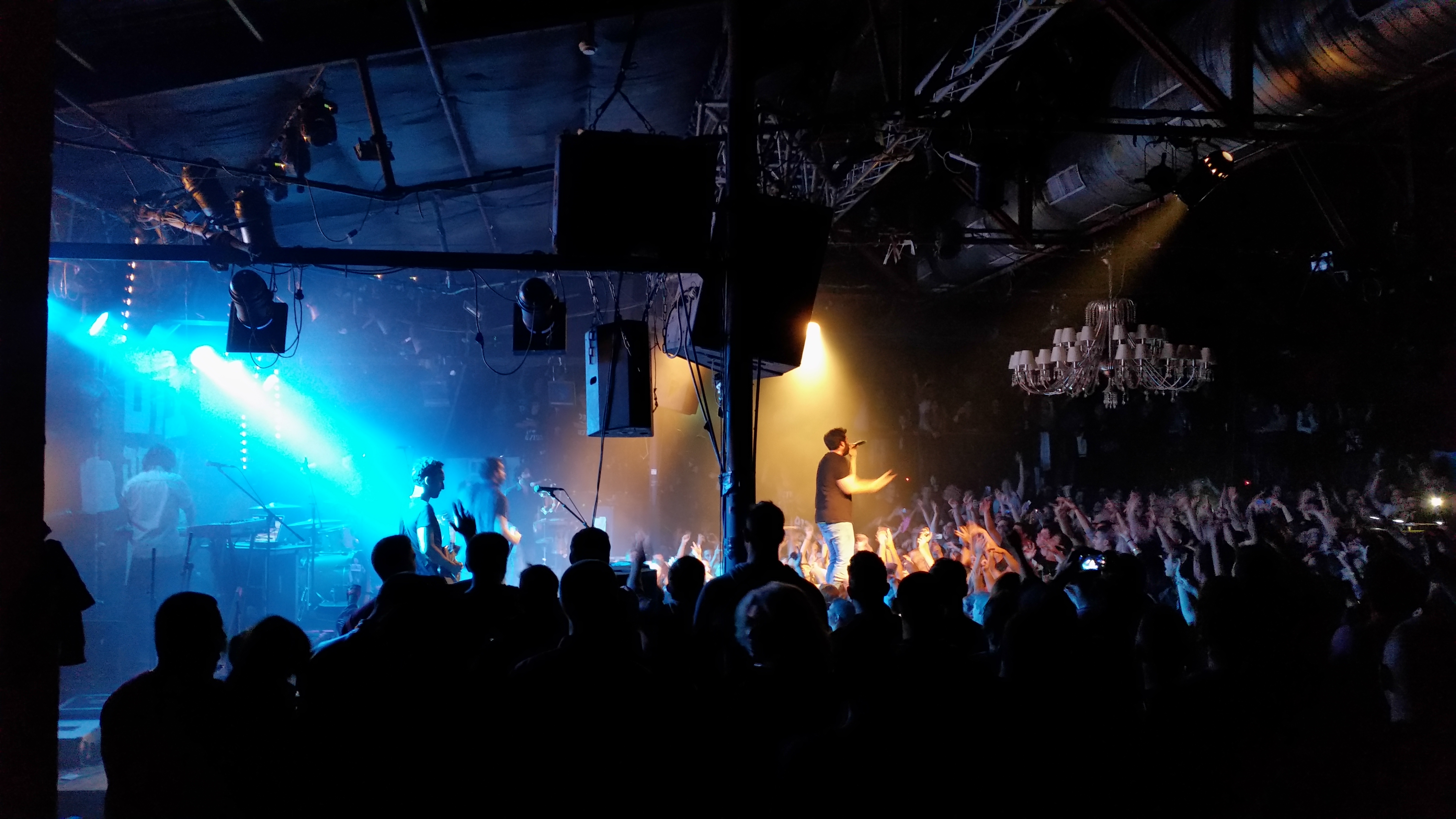 נצ'י נץ' בהופעה בבארבי